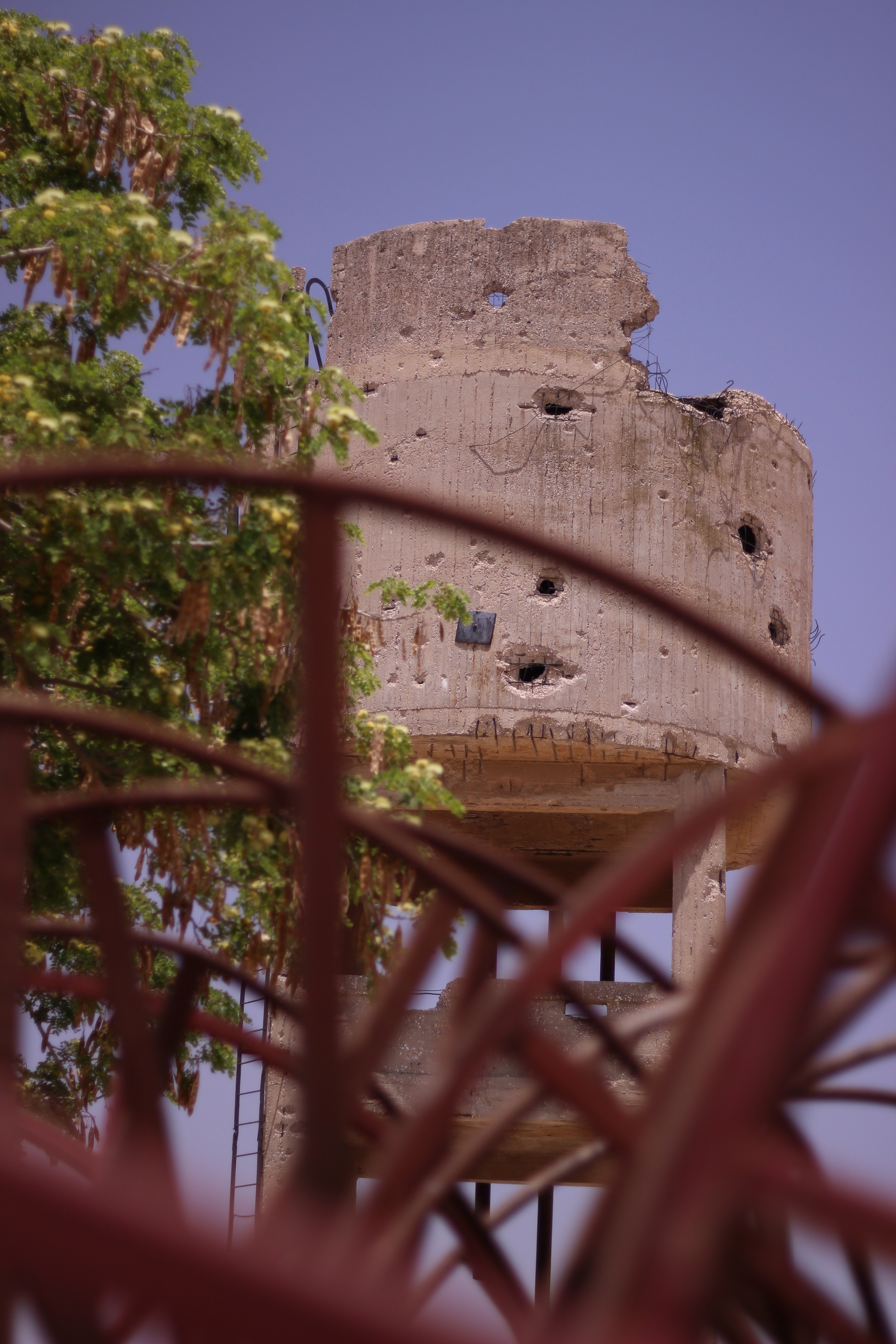 .מגדל המים בבארות יצחק הישנה, בנגב מבט מדרום-מערב